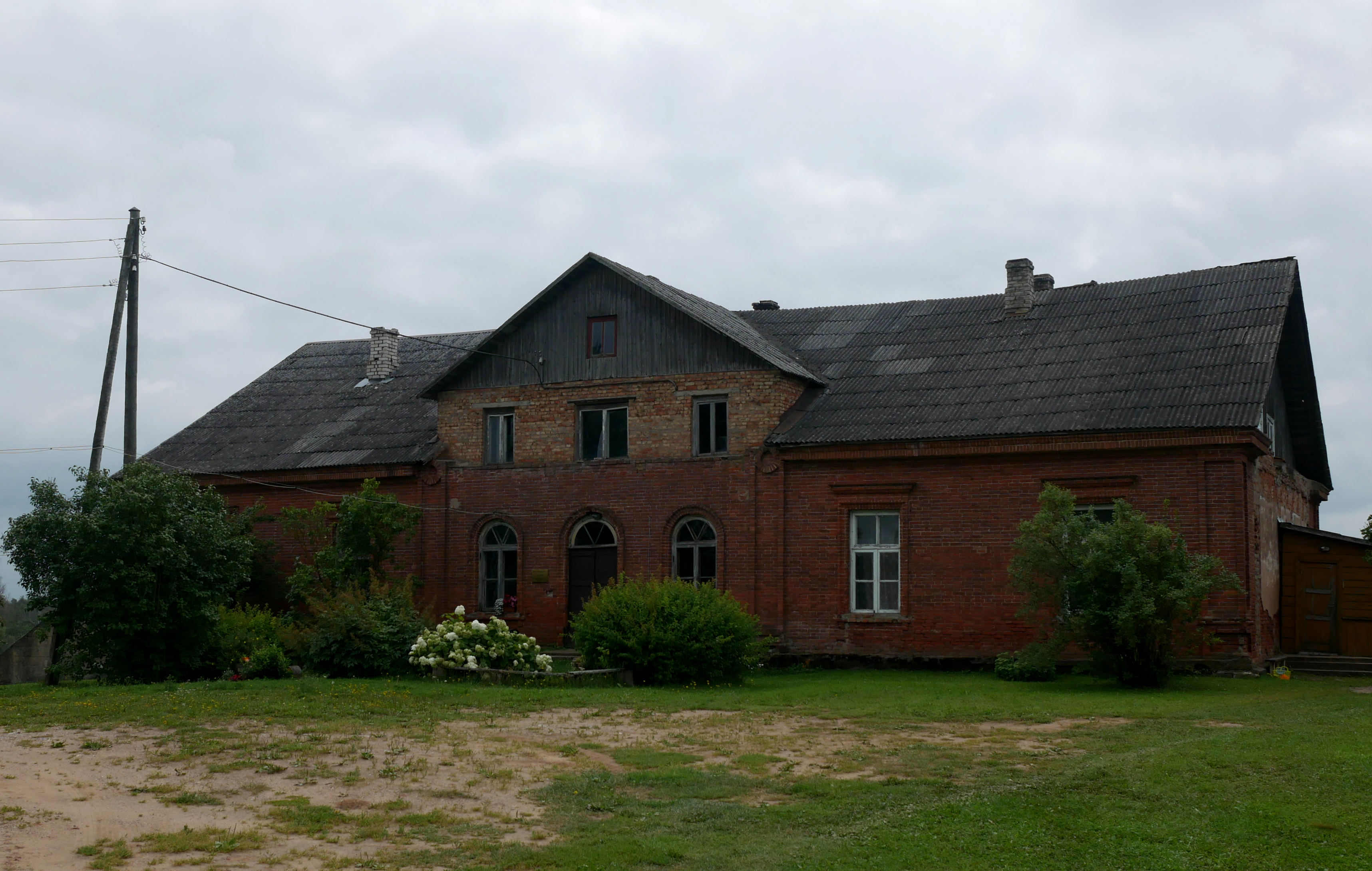 Bonifacova mõisa peahoone 2019. aastal